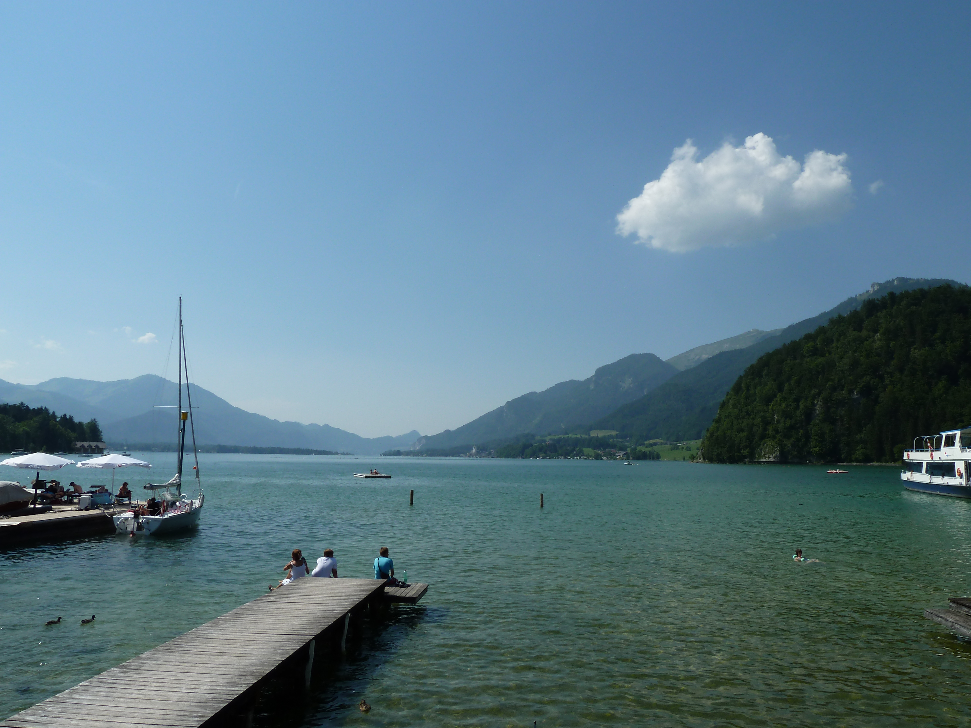 Strobl Blick auf Wolfgangsee